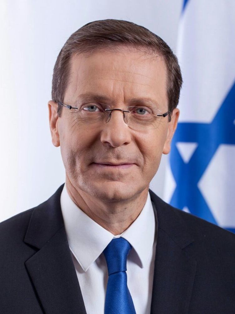 יצחק הרצוג הוא ראש האופוזיציה וחבר הכנסת מטעם מפלגת העבודה החל משנת 2003. כיהן כשר בממשלות ישראל ובשנים 2013–2017 כיו"ר מפלגת העבודה. עורך דין במקצועו.